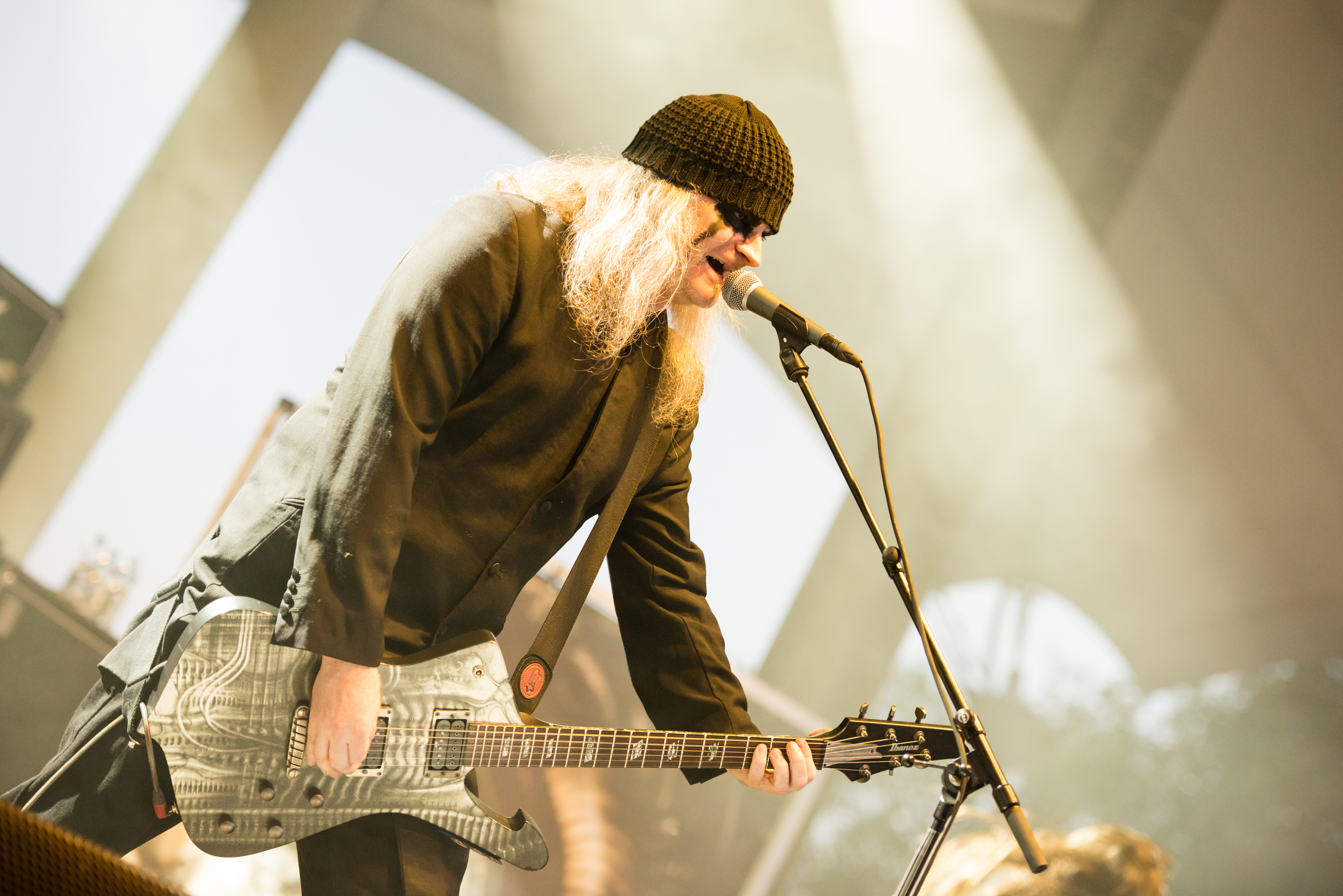 'Rock Hard Festival 2014 - Gelsenkirchen': 'Triptykon'